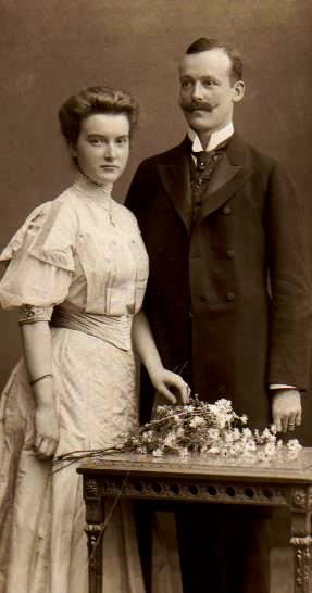 Magdalene von Waldthausen, geb. von Goßler, 1909, als Verlobte mit ihrem späterem Ehemann, Heinrich von Waldthausen